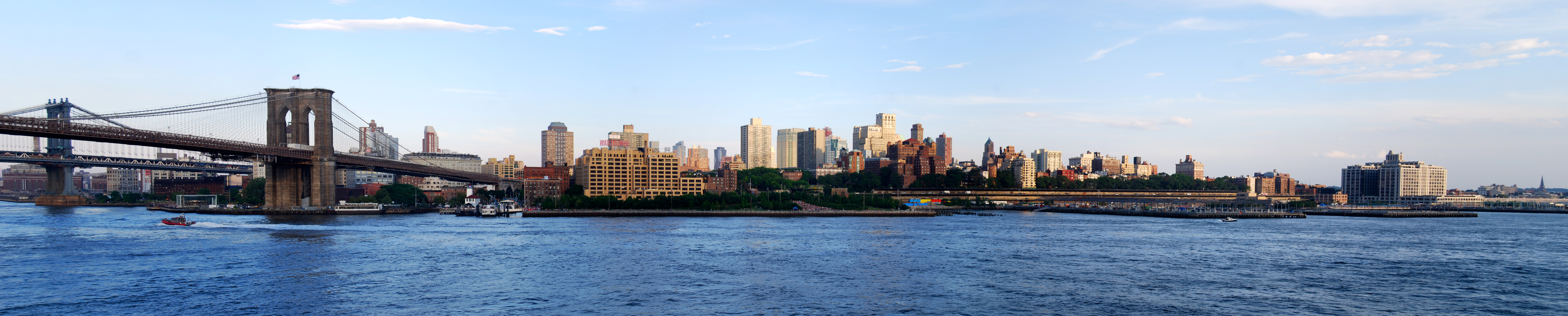 Brooklyn Skyline